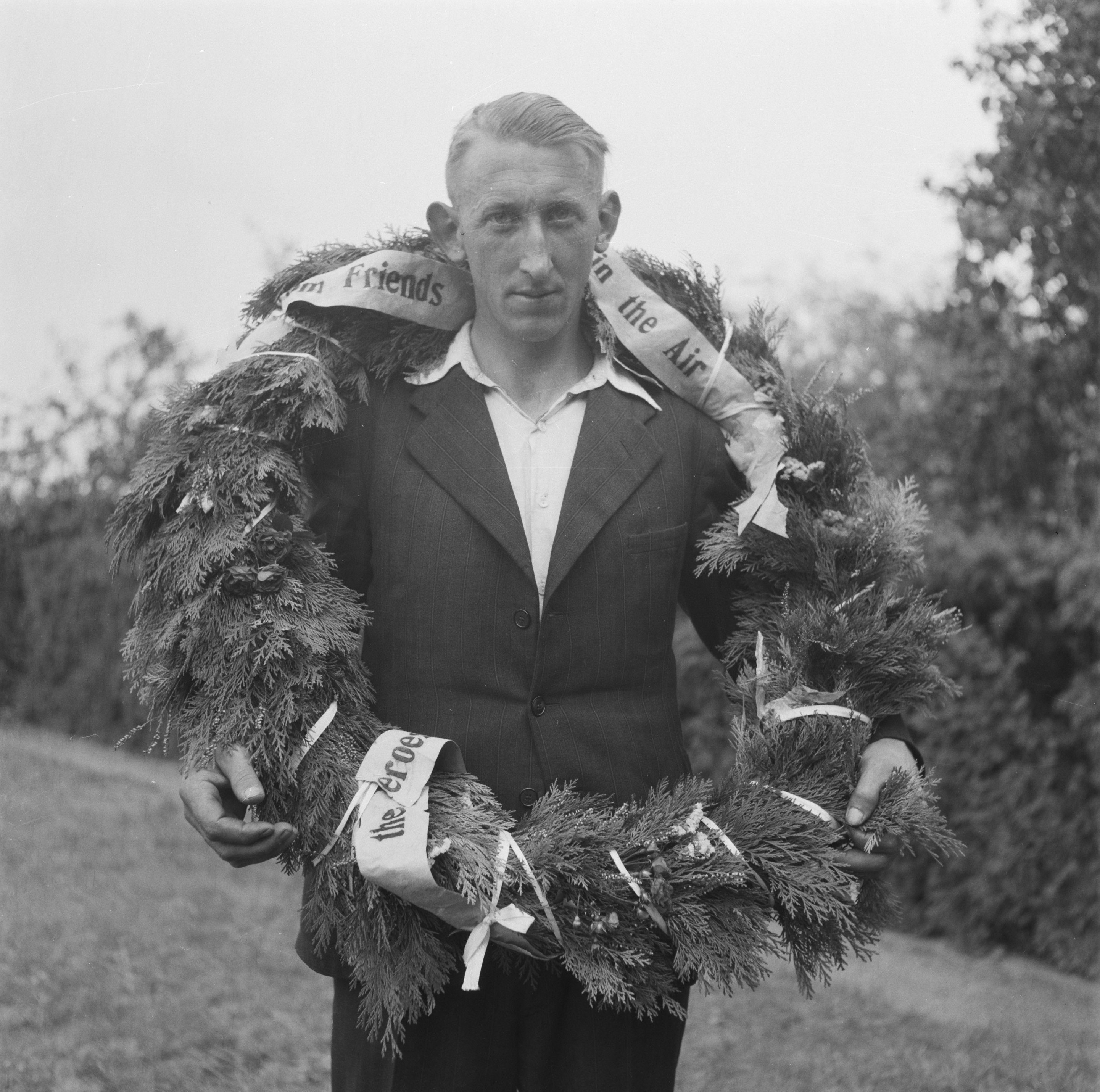 Collectie / Archief : Fotocollectie Anefo Reportage / Serie : Serie over de Limburgse families Smedts en Poels uit Horst die tijdens de Tweede Wereldoorlog ca. 300 geallieerde piloten (boven Nederland neergeschoten) in de boerderij "De Zwarte Plak" hielp verbergen en over grens naar Belgie wist te brengen. Beschrijving : Bert Poels met de krans voor het graf van zijn vader Datum : 1945 Locatie : America, Horst, Limburg Trefwoorden : illegaliteit, onderduikers, tweede wereldoorlog Fotograaf : Raucamp, Koos / Anefo Auteursrechthebbende : Nationaal Archief Materiaalsoort : Negatief (zwart/wit) Nummer archiefinventaris : bekijk toegang 2.24.01.03 Bestanddeelnummer : 900-6523